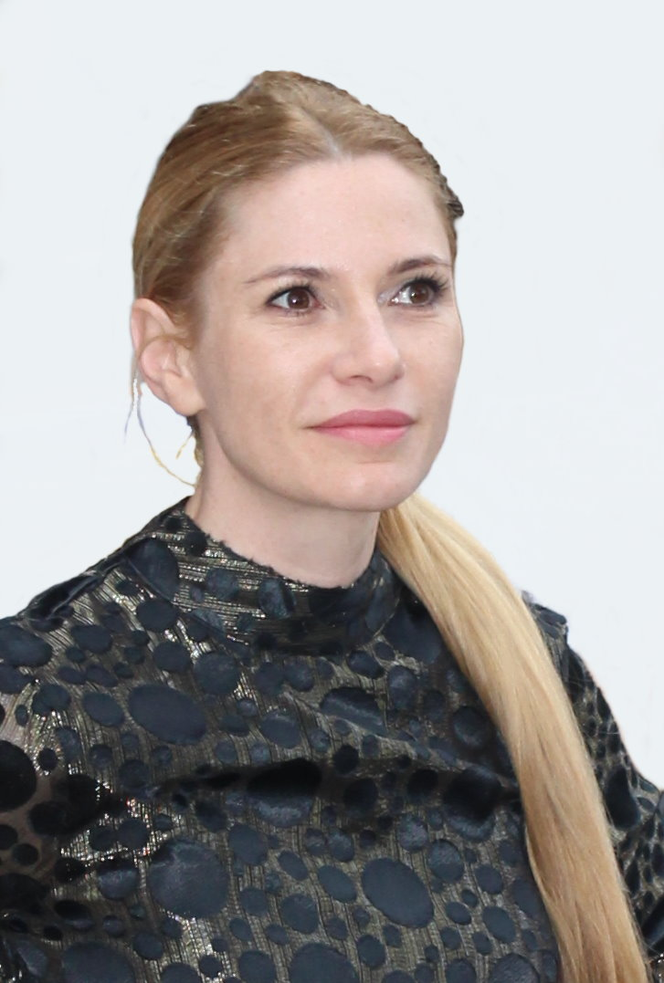 Laura Lackmann, geboren 1979 in Berlin, hat an der New-York-Filmakademie und der dffb Berlin Regie studiert. Sie ist als Drehbuchautorin und Regisseurin tätig. Aufnahme 2018.